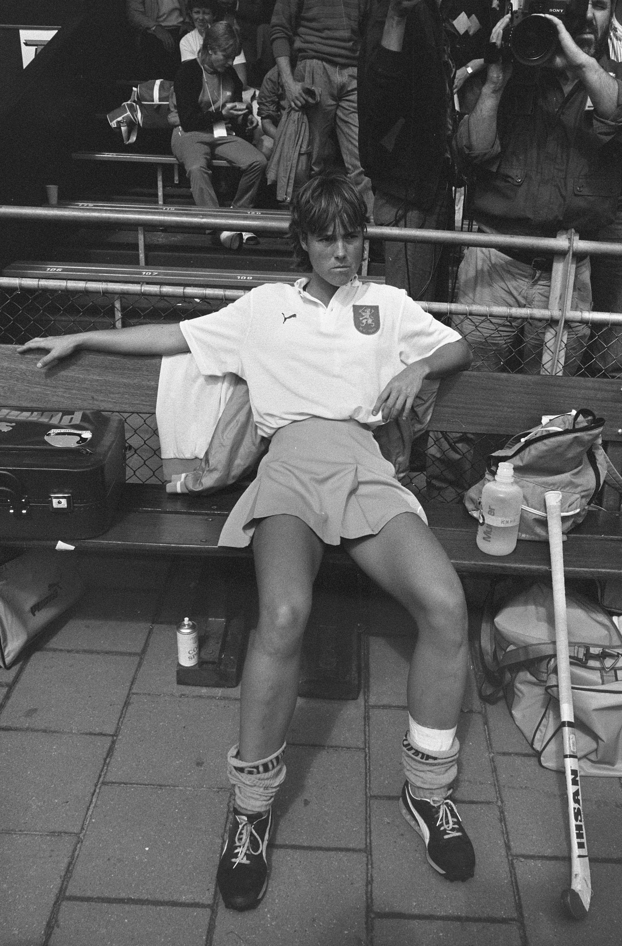 Wereldkampioenschappen hockey dames: Nederland-Canada; teleurgestelde Lisanne Le Jeune na nederlaag